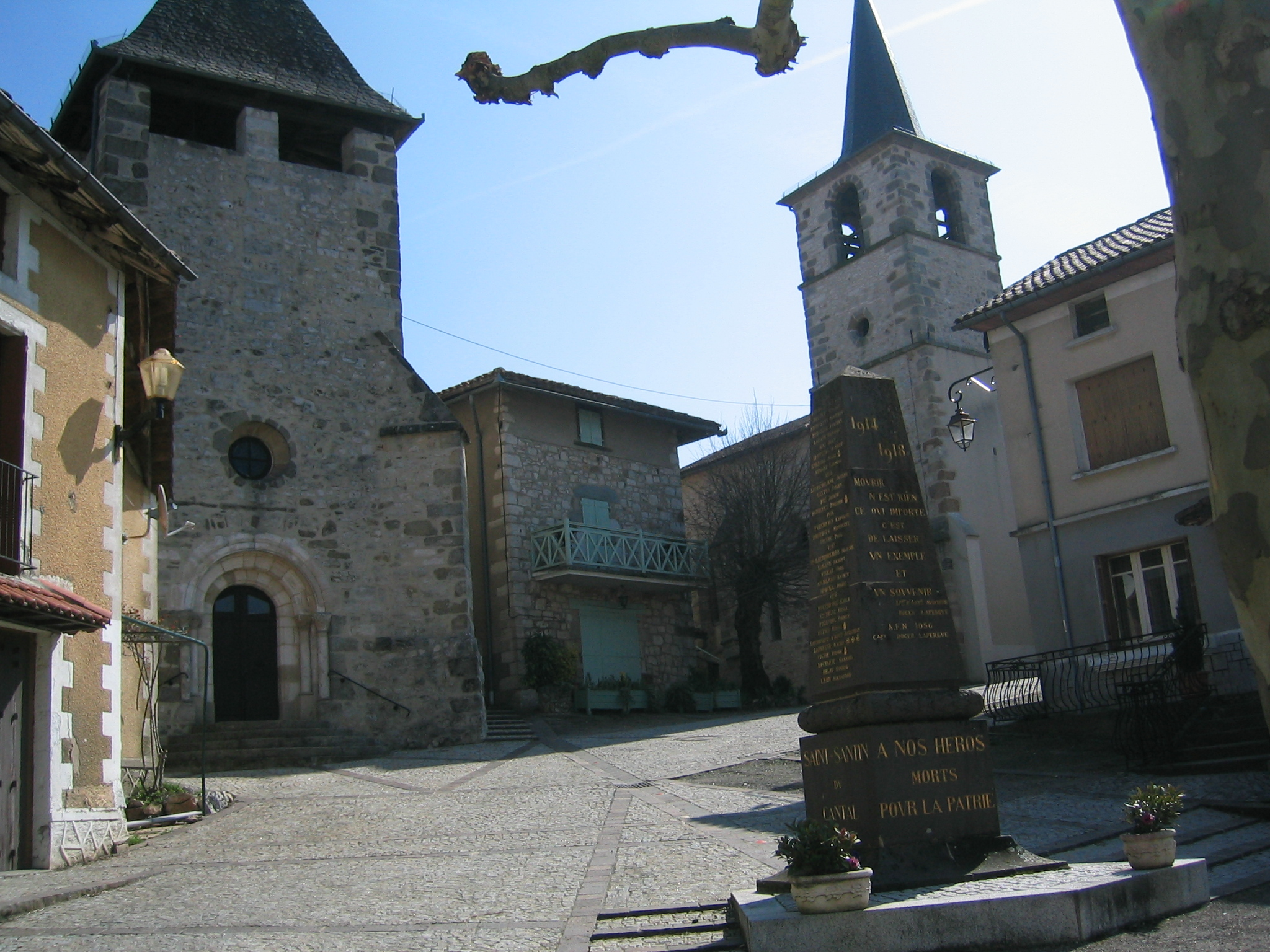 vue de la place des deux Saint-Santin (Cantal et Aveyron) avec leurs deux églises